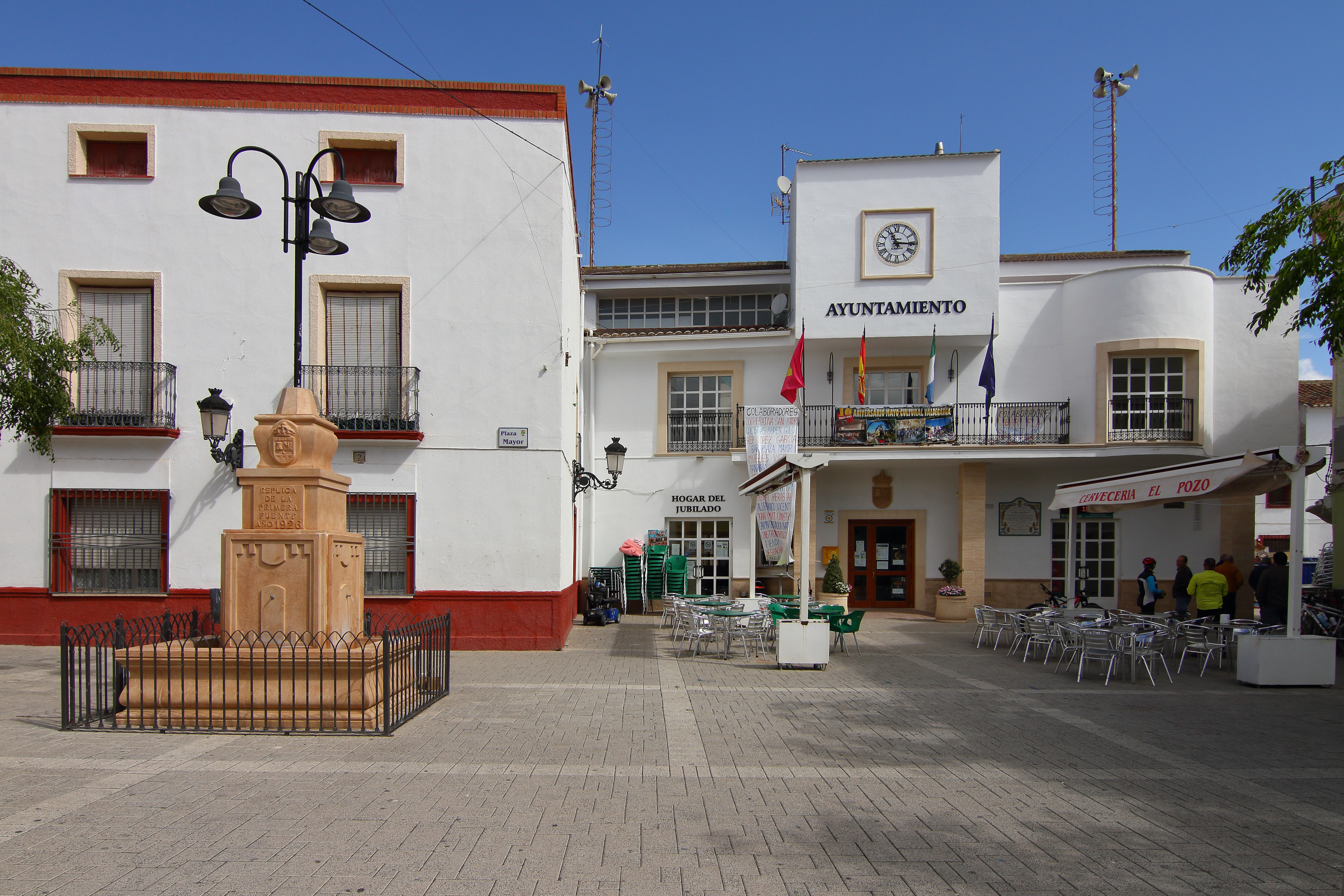 Valdeganga, Ayuntamiento